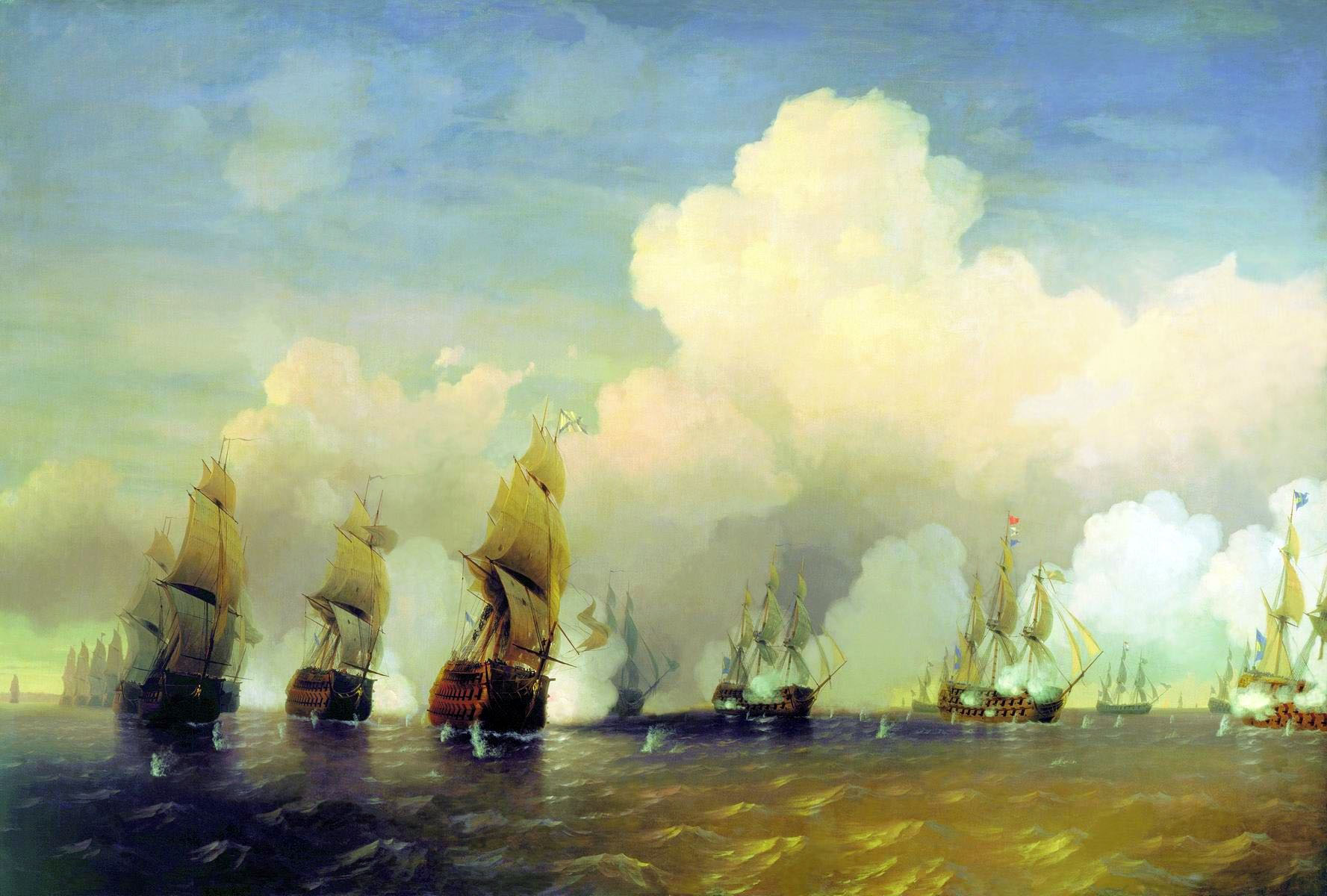 Sailing ships in the Baylabel QS:Lru,"Боголюбов А.П.. Сражение русского флота со шведским флотом в 1790 году вблизи Кронштадта при Красной Горке" label QS:Len,"Sailing ships in the Bay"